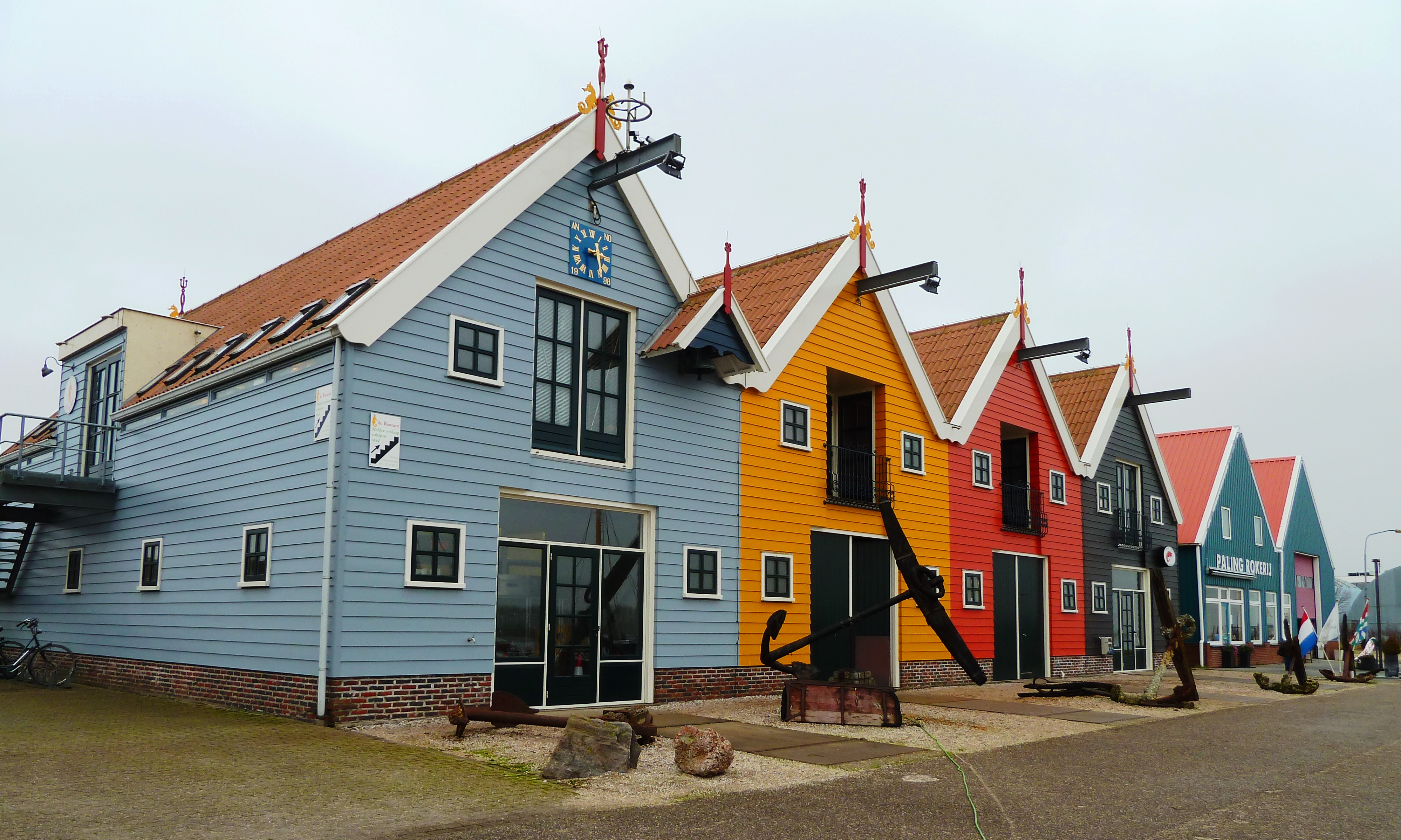 Huisjes en palingrokerij aan de Reitdiepskade in Zoutkamp. Deze kleurrijke houten bebouwing dateert uit de jaren 1990. De huisjes zijn van reder en handelaar Matthijs van der Ploeg, herkenbaar aan de garnalen nabij de topgevel.